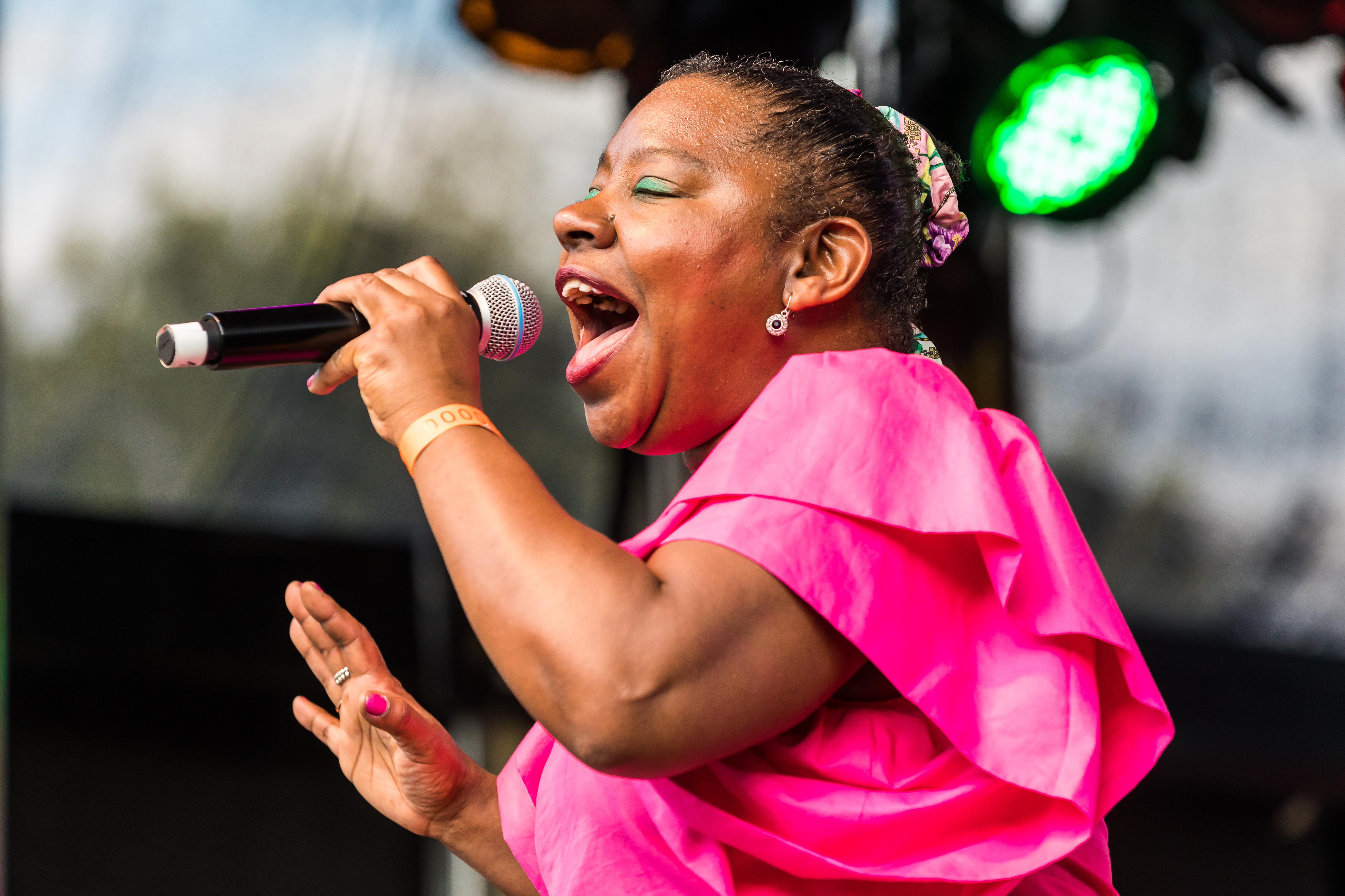 ColognePride 2019-Sonntag-Hauptbühne-2000-Tania Evans. ft. Wyllywyll